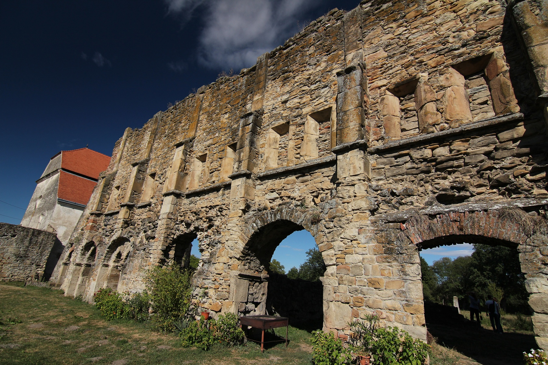 Closter (parțial și în substrucțiile casei parohiale evanghelice) Cârța 03